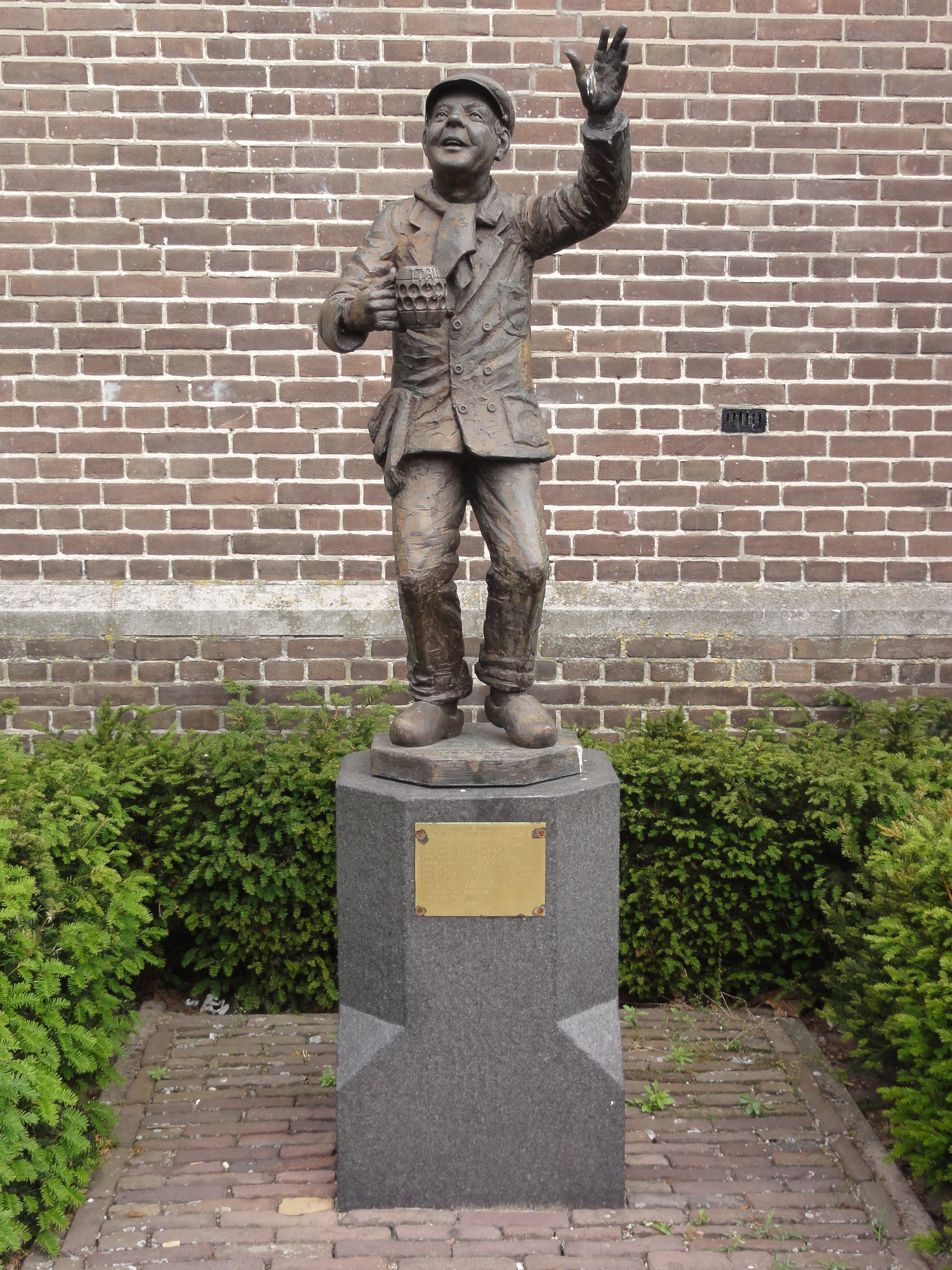 Bakel sculptuur Carnaval, kerkplein